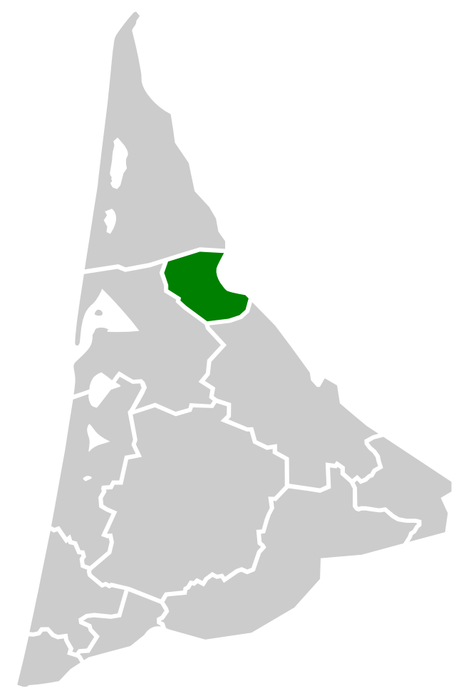 Localisation des Landes de Bordeaux